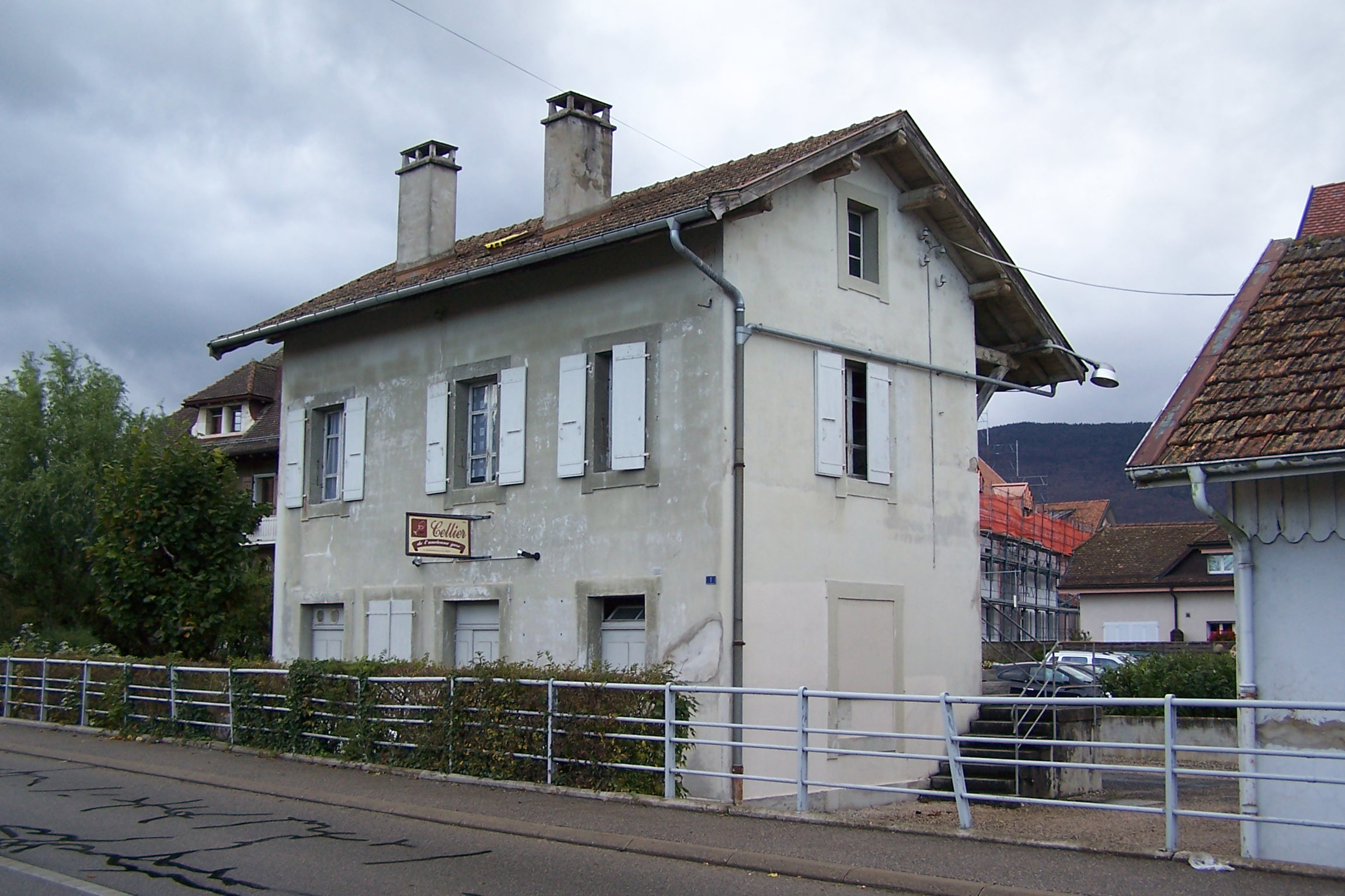 Ehemaliger Bahnhof Crassier-La Rippe an der abgebauten Bahnstrecke Nyon–Crassier.